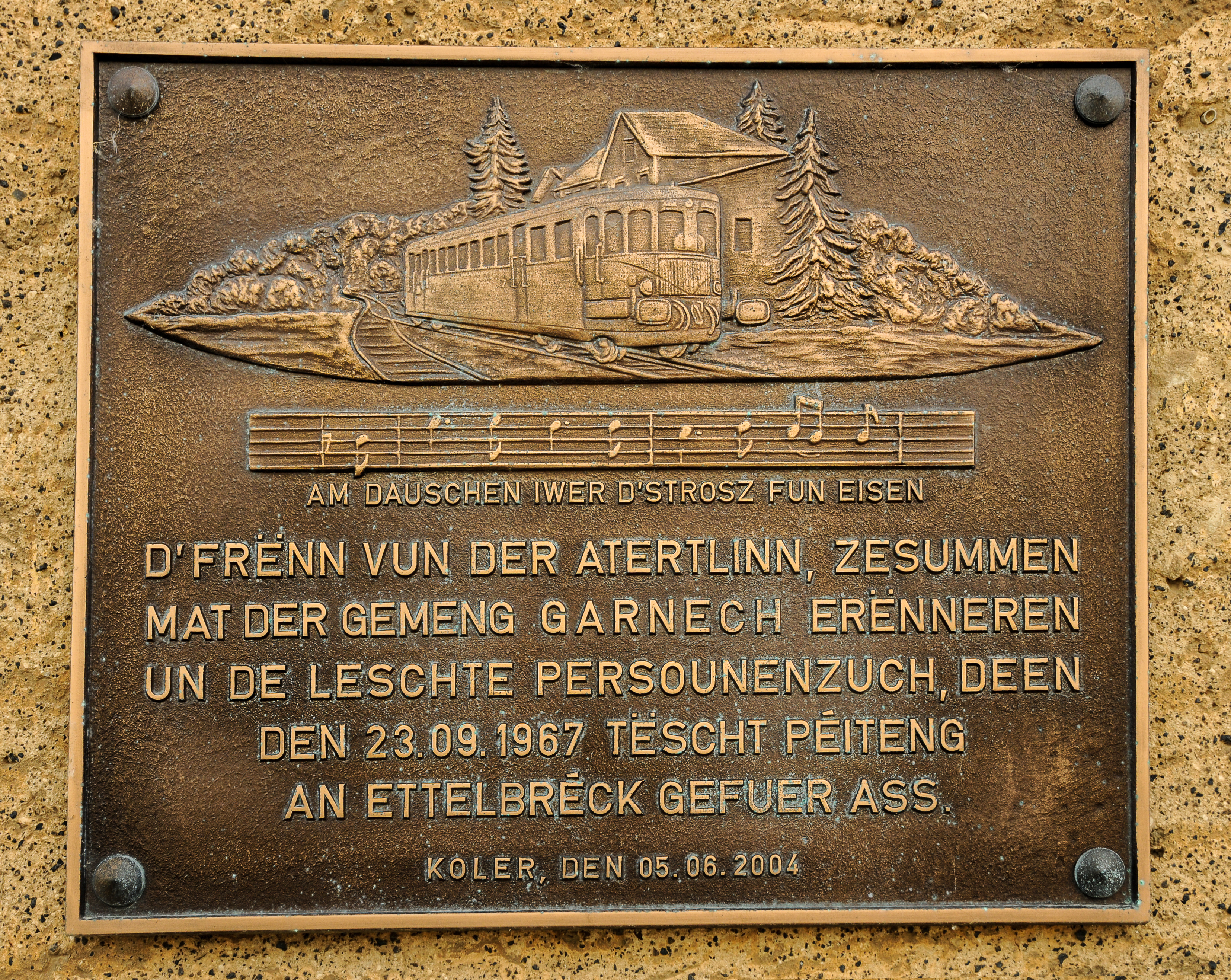 D'Plack un der fréierer Gare vun der Atertlinn zu Koler.